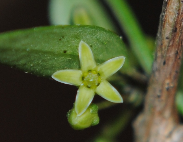 Orthosia virgata. Apocynaceae.Fotos tomadas sobre arbustos bajo monte de pinos al margen de la Ruta 55 en Palmar, departamento de Soriano, Uruguay.